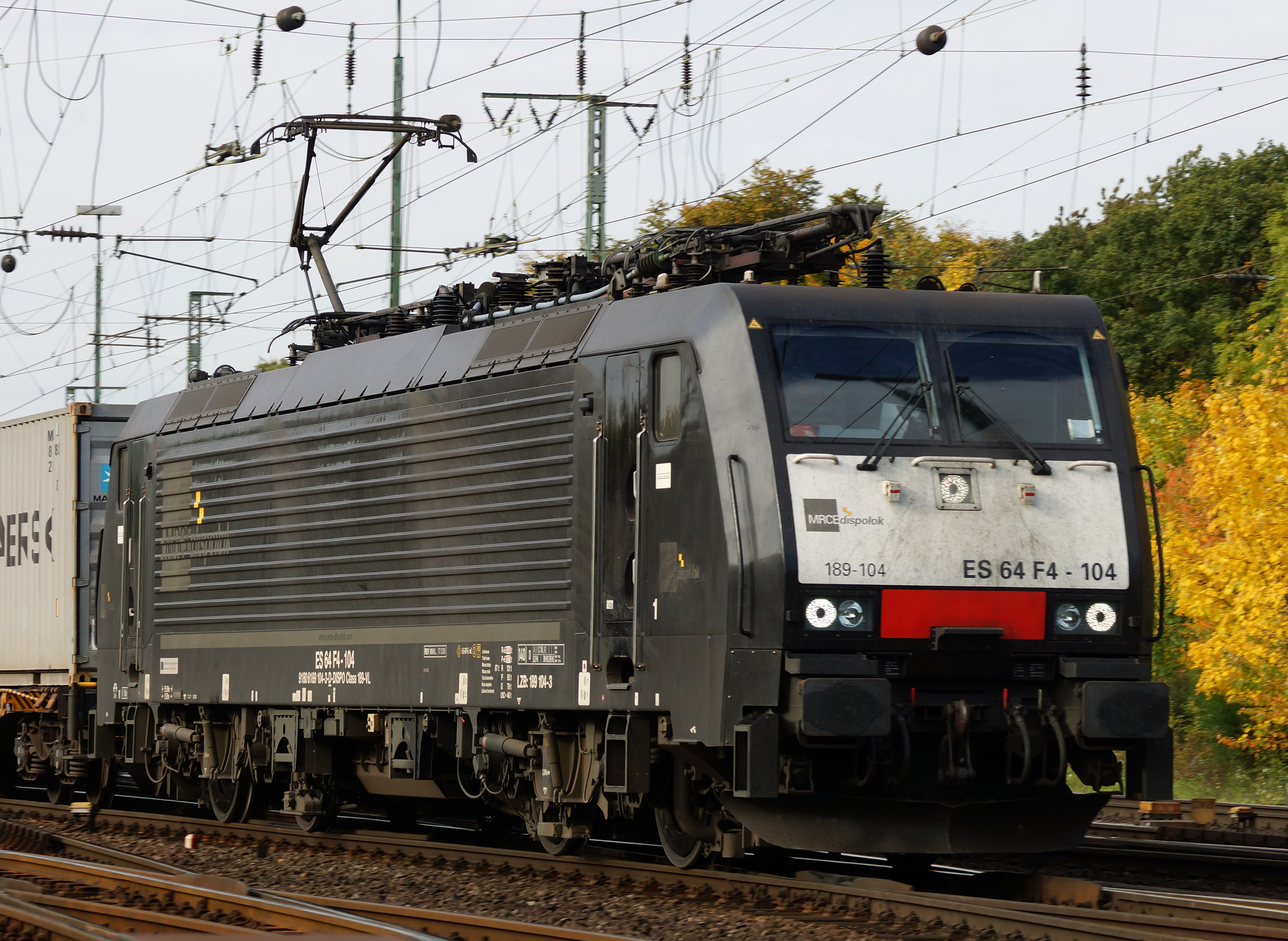 MRCE Dispolok ES 64 F4-104 in der Nähe des Rangierbahnhof Gremberg.